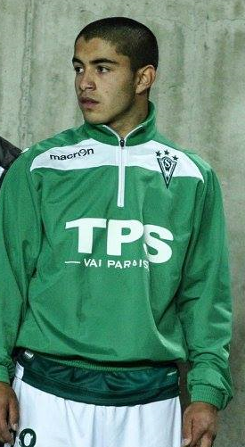 Fotografía de Gabriel Rojas, futbolista chileno.